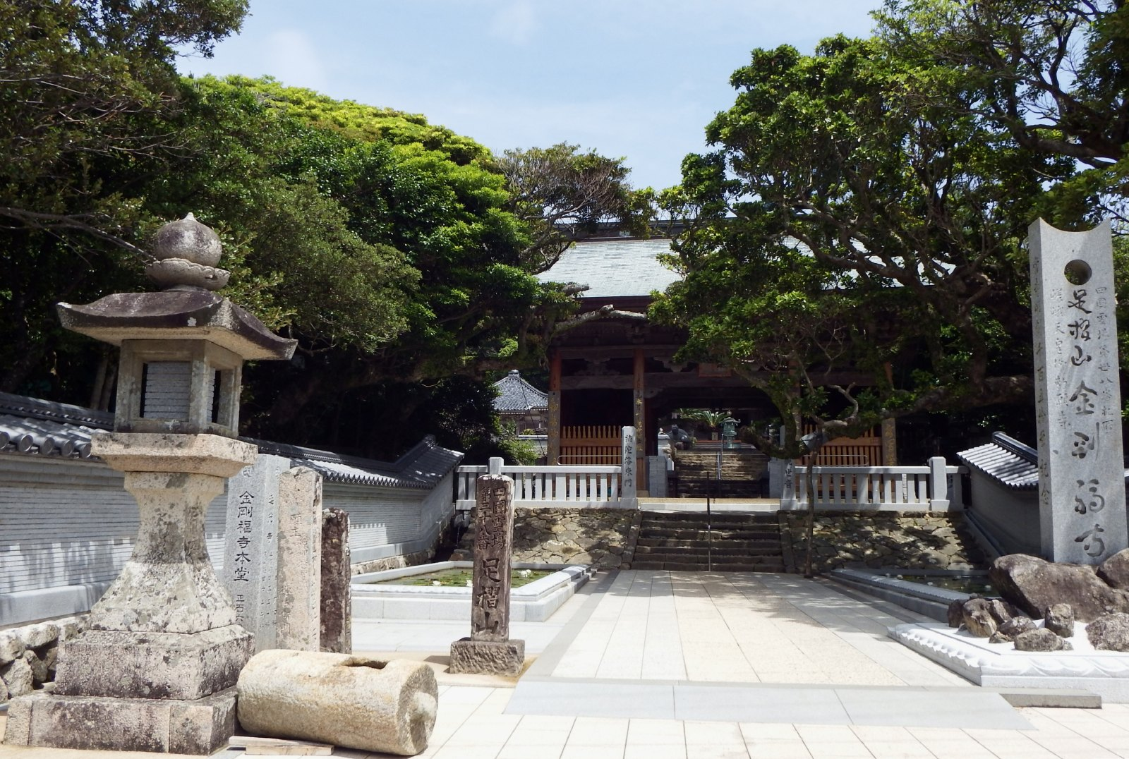 金剛福寺の山門